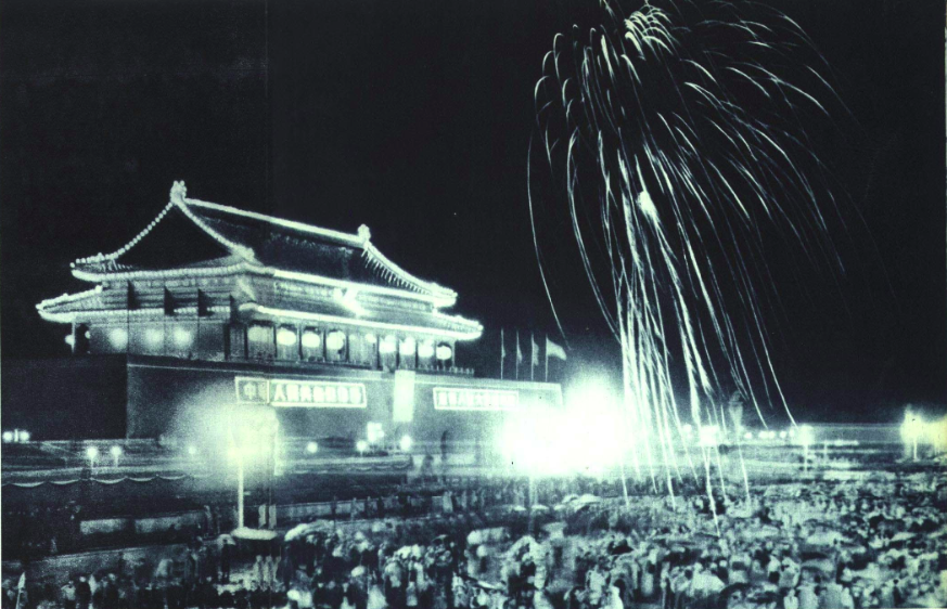 1952年5月五一劳动节